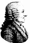 Etienne Louis Geoffroy (1725-1810)